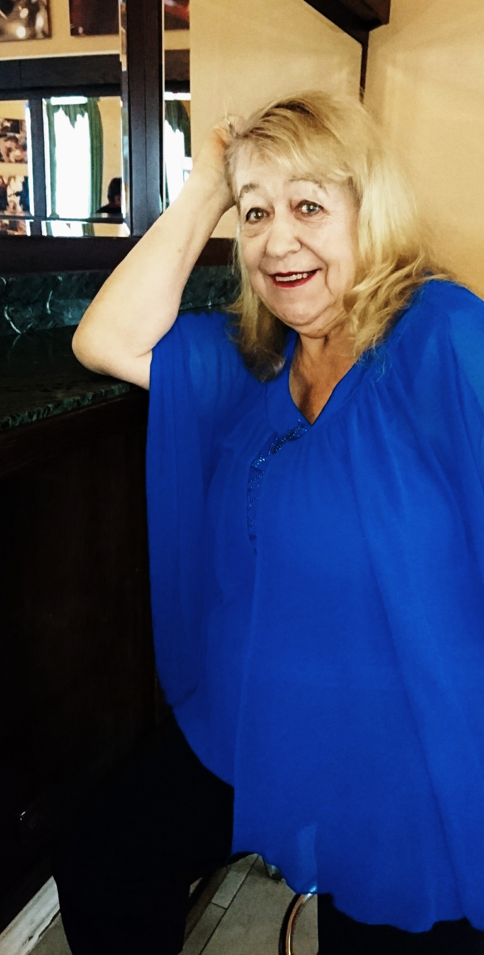 Пруднікова Людмила Петрівна, професор НМАУ, заслужений діяч мистецтв України.